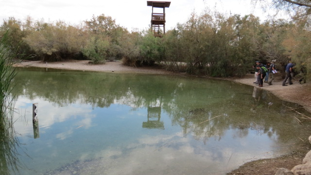 Ein Feshkha - Einot Tzukim, Dead Sea, Palestine Einot Tzukim עינות צוקים